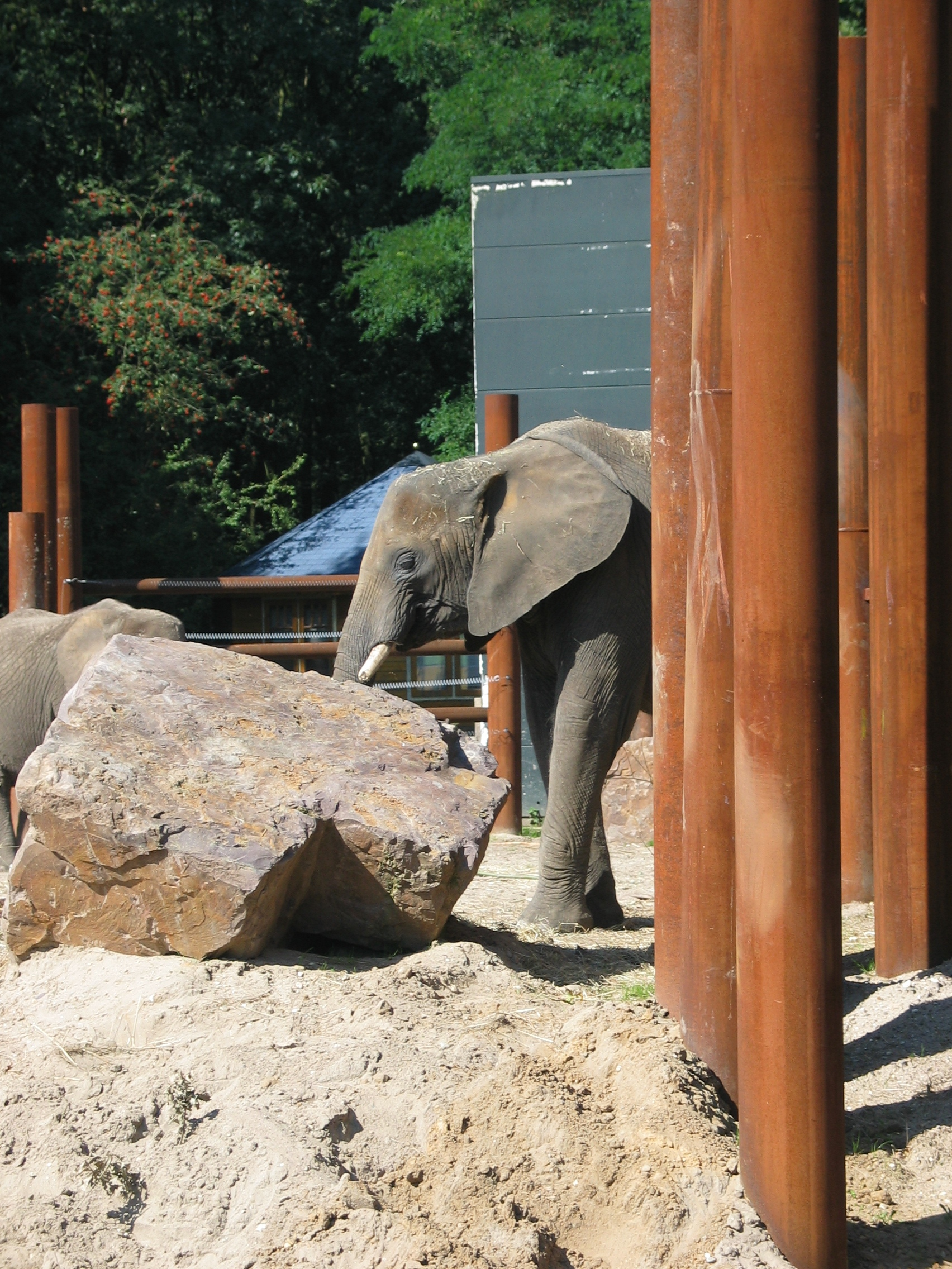 An African Elephant in Ouwehands Dierenpark (Netherlands)